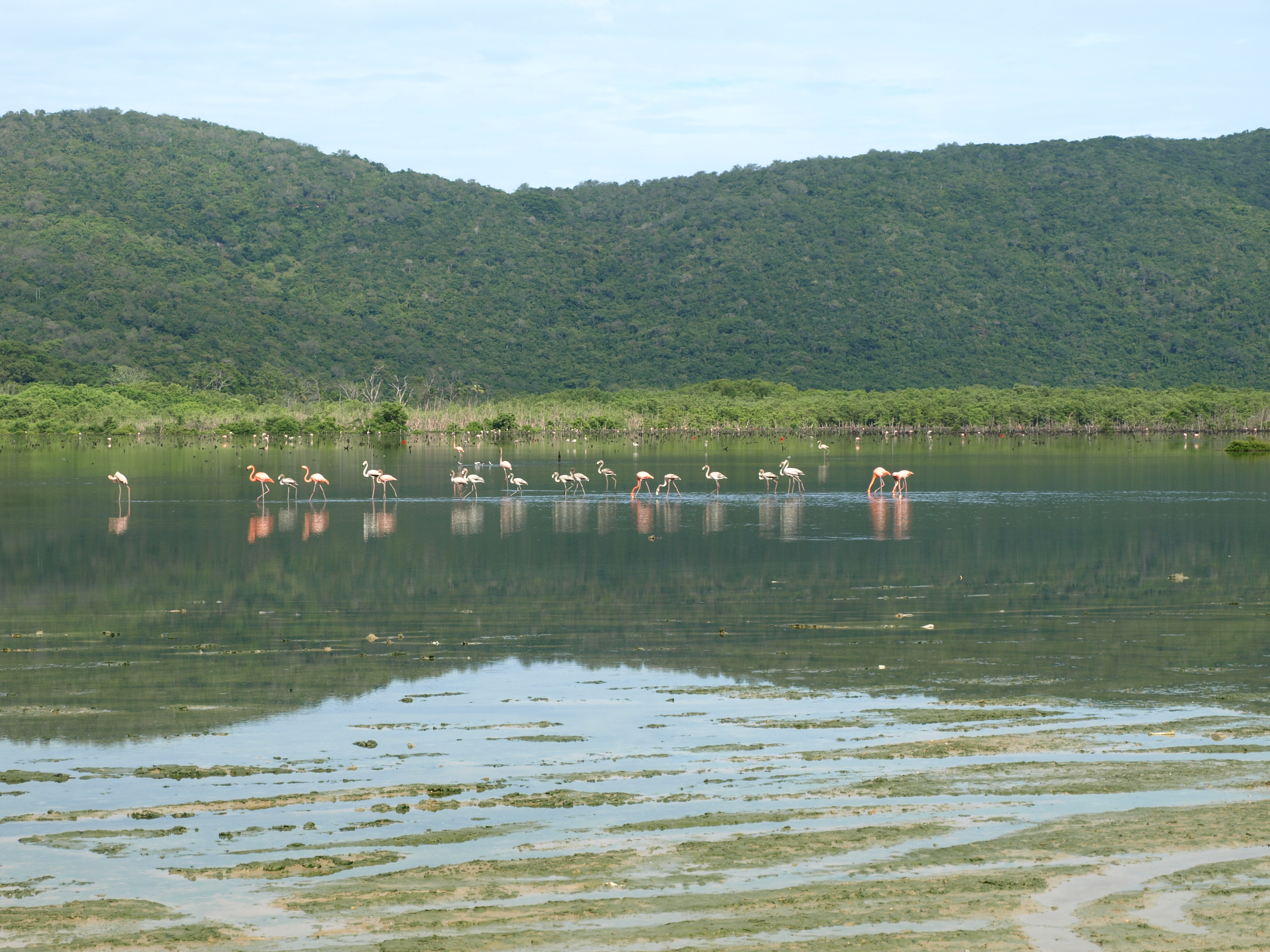 EL BAILE SECRETO DE LOS FLAMINGOS